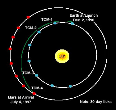 מסלול פאת'פיינדר מכדור הארץ אל מאדים